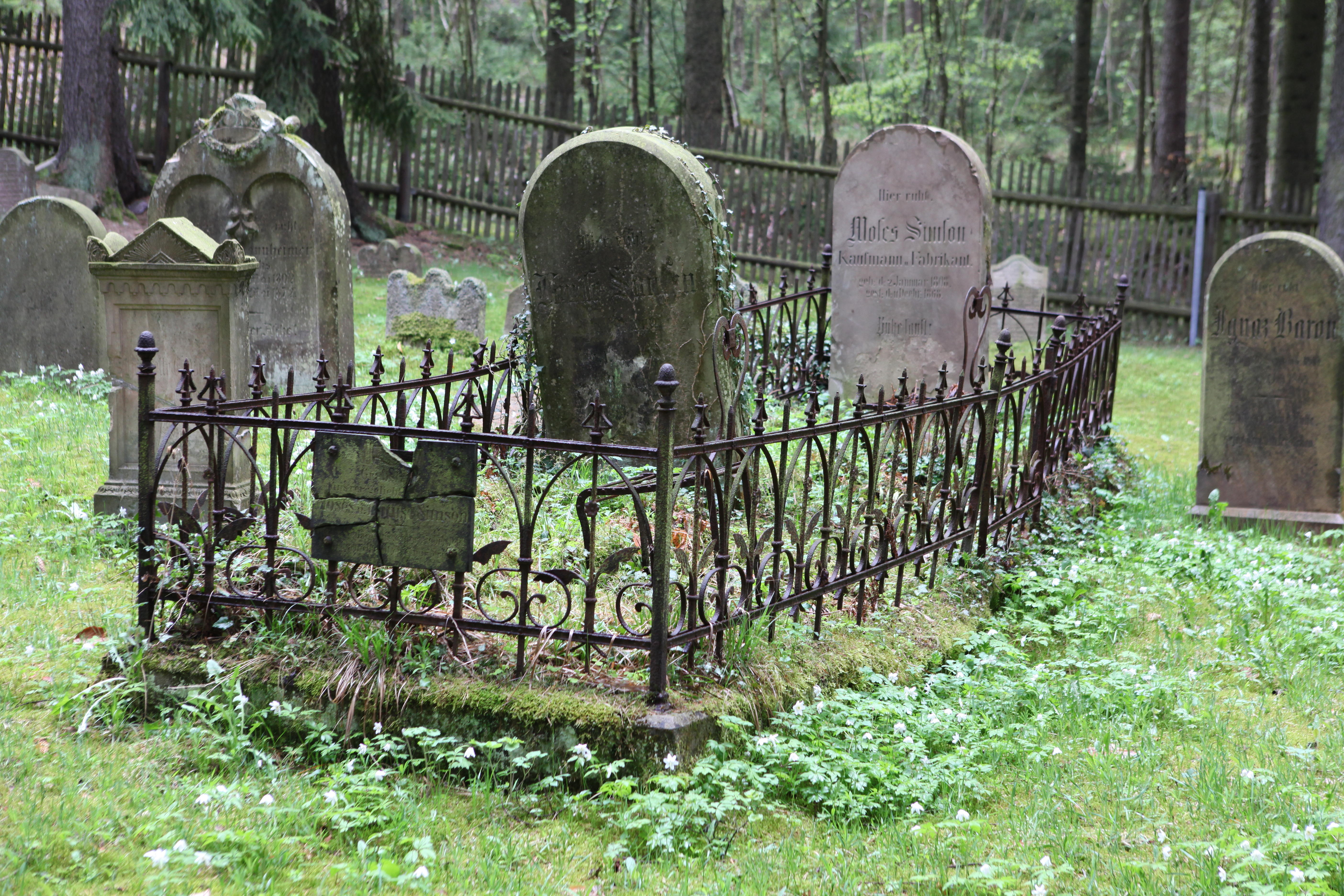 Doppelgrab der Familie Simson auf dem Jüdischen Friedhof in Heinrichs, Ortsteil von Suhl